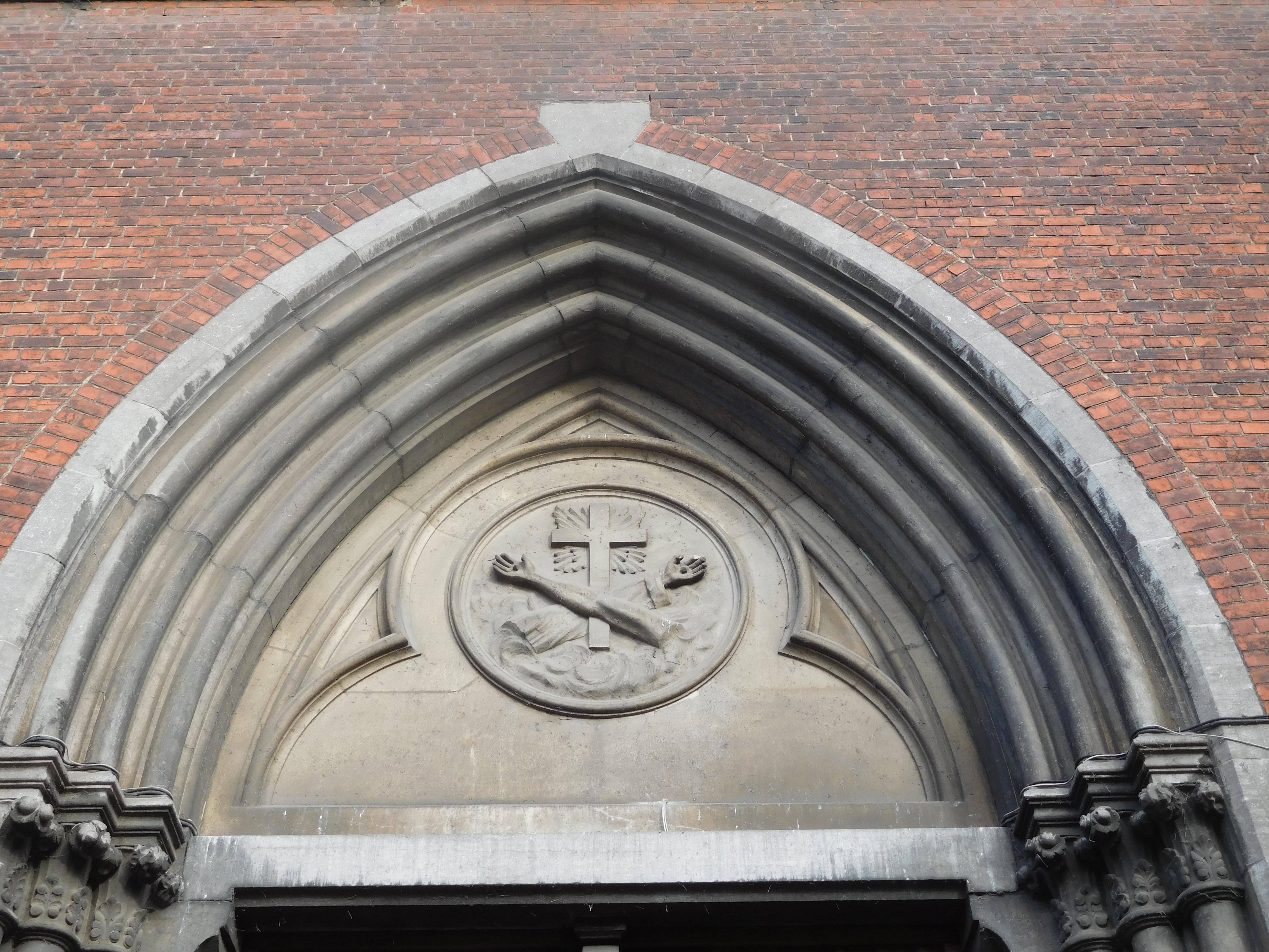 Le blason des Franciscains se trouve au-dessus de la porte d'entrée de l'église Saint-François d'Assise, de Schaerbeek (Bruxelles)